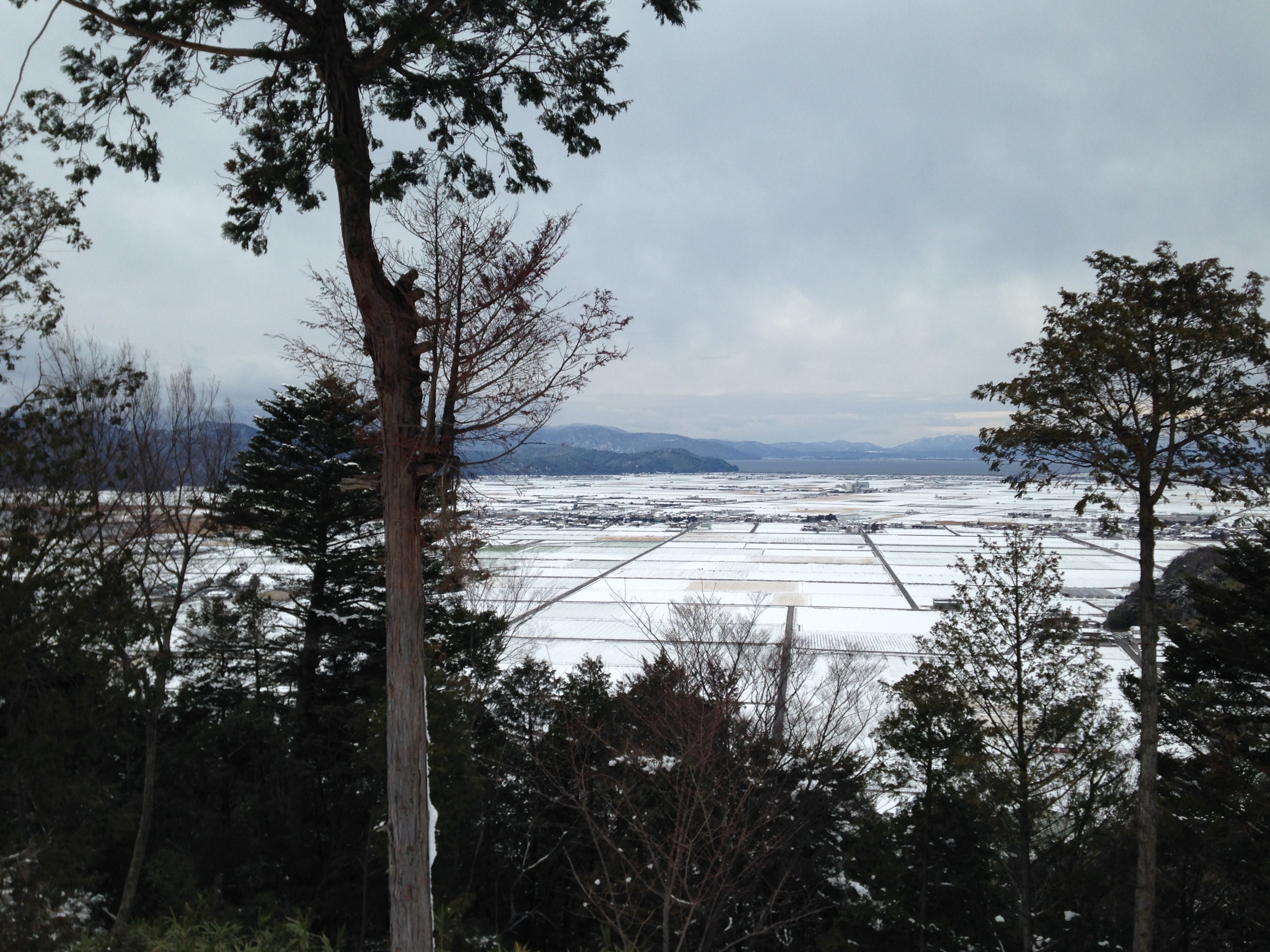 安土山より琵琶湖を望む